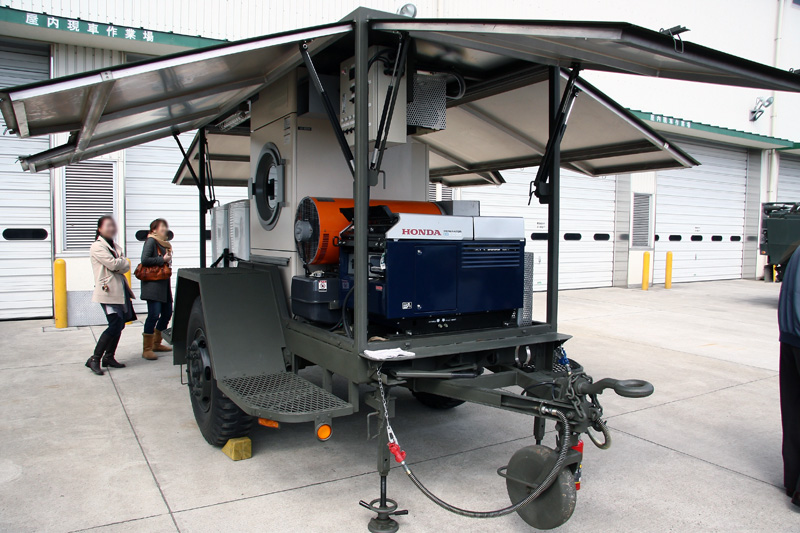 記念式典にて展示される野外洗濯セット2型